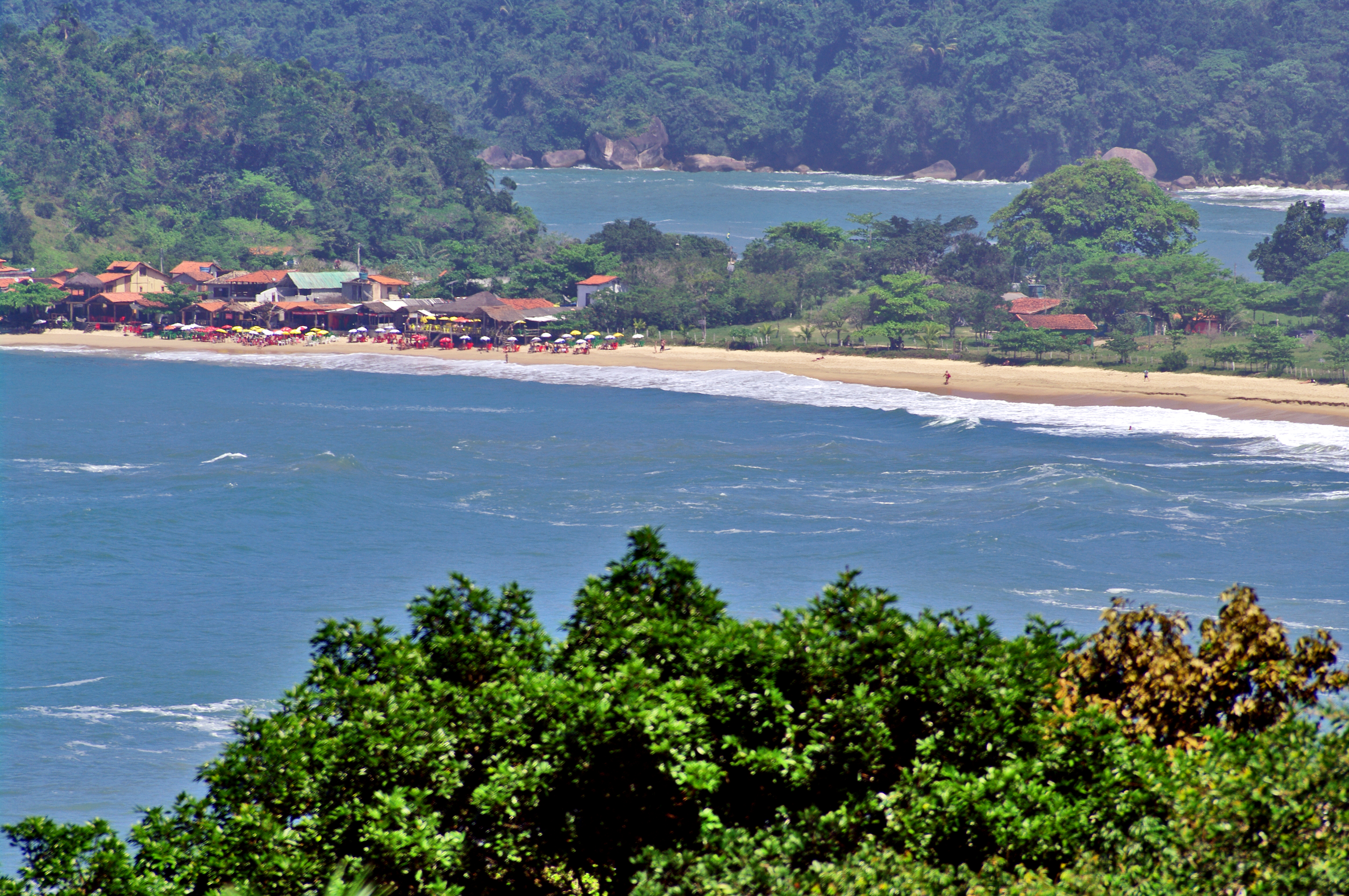 Trindade